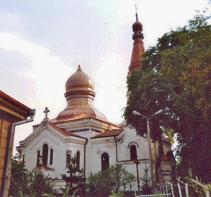 Cerkiew Narodzenia NMP we Włodawie